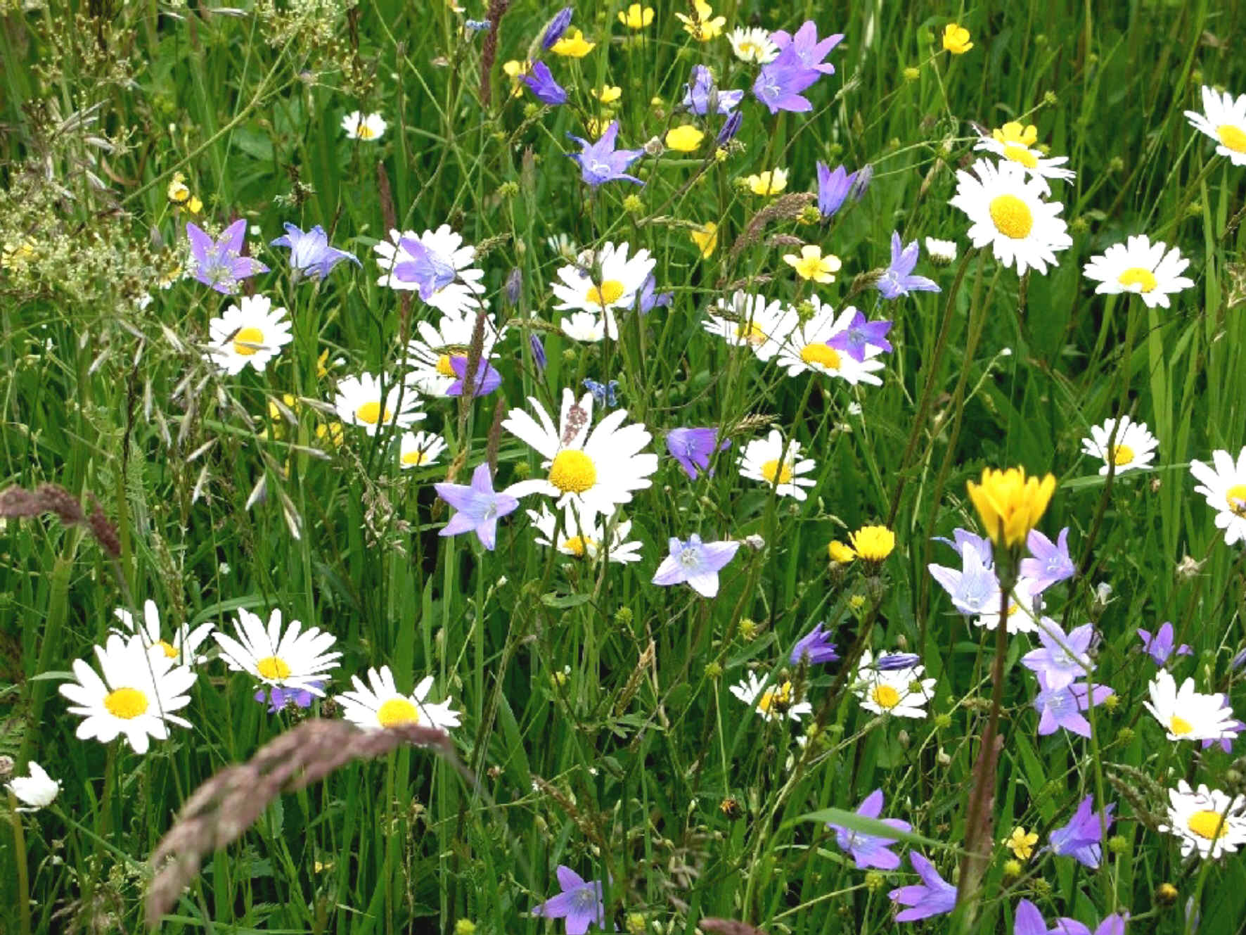 Ausschnitt Blumenwiese